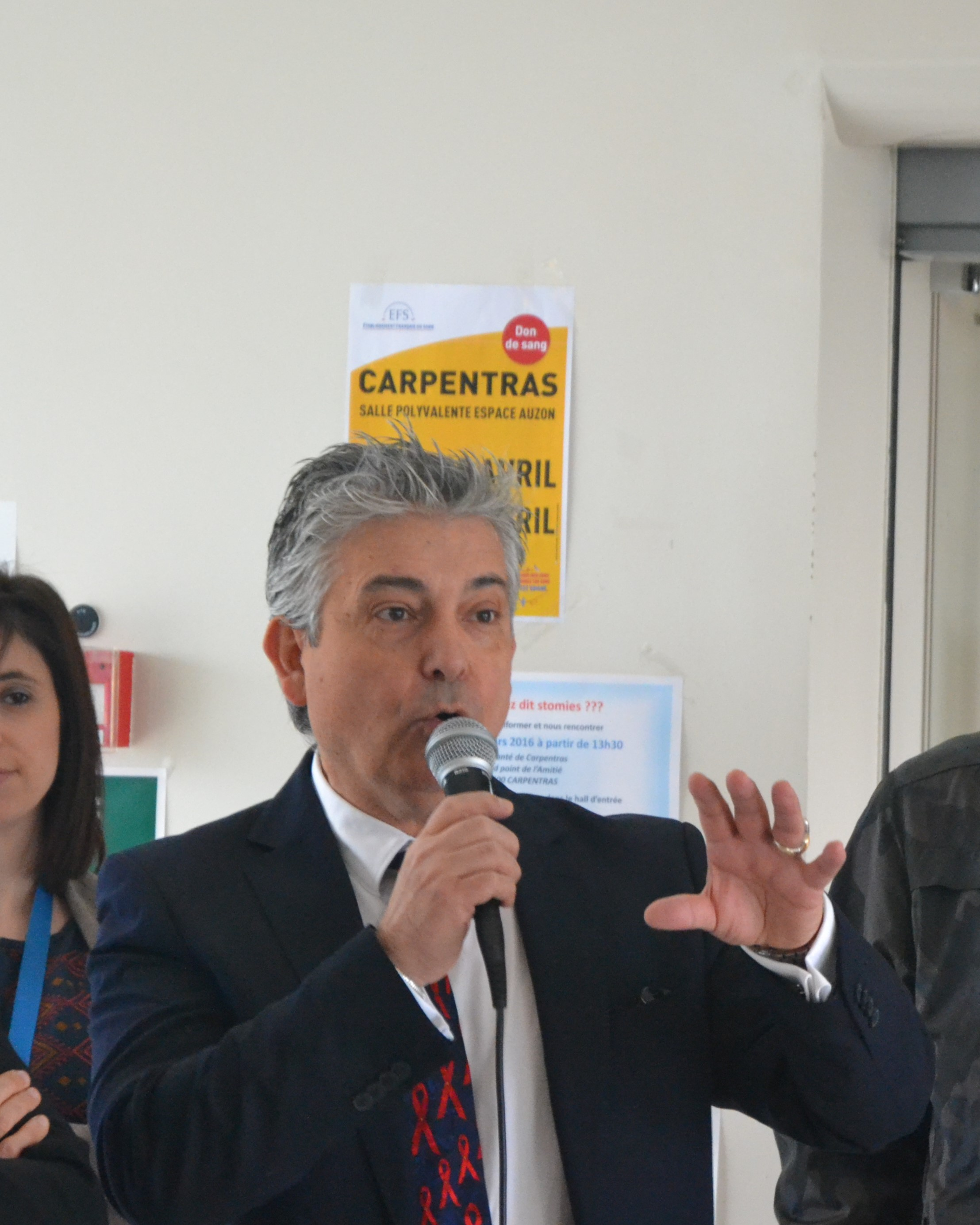 Le chanteur Enriqué, lors d'une réunion au Pole Santé de Carpentras